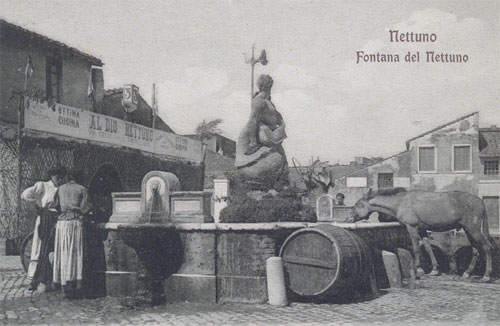 La fontana del dio Nettuno in piazza del Mercato a Nettuno (Roma)